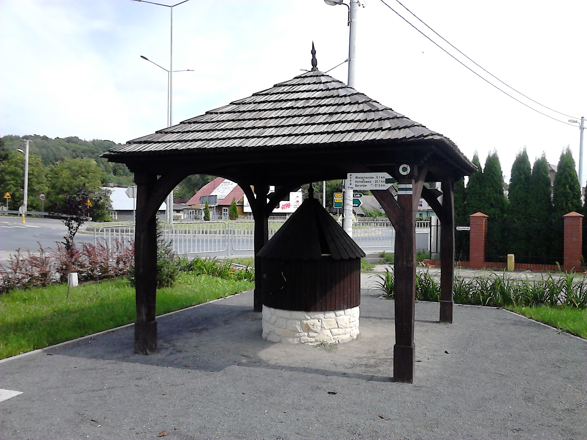 Studnia austriacka z 1914 (Bochotnica).